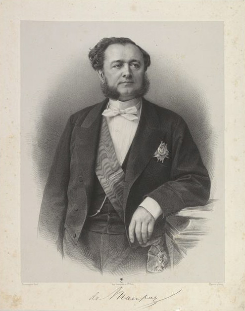 Lithographie de Charlemagne de Maupas